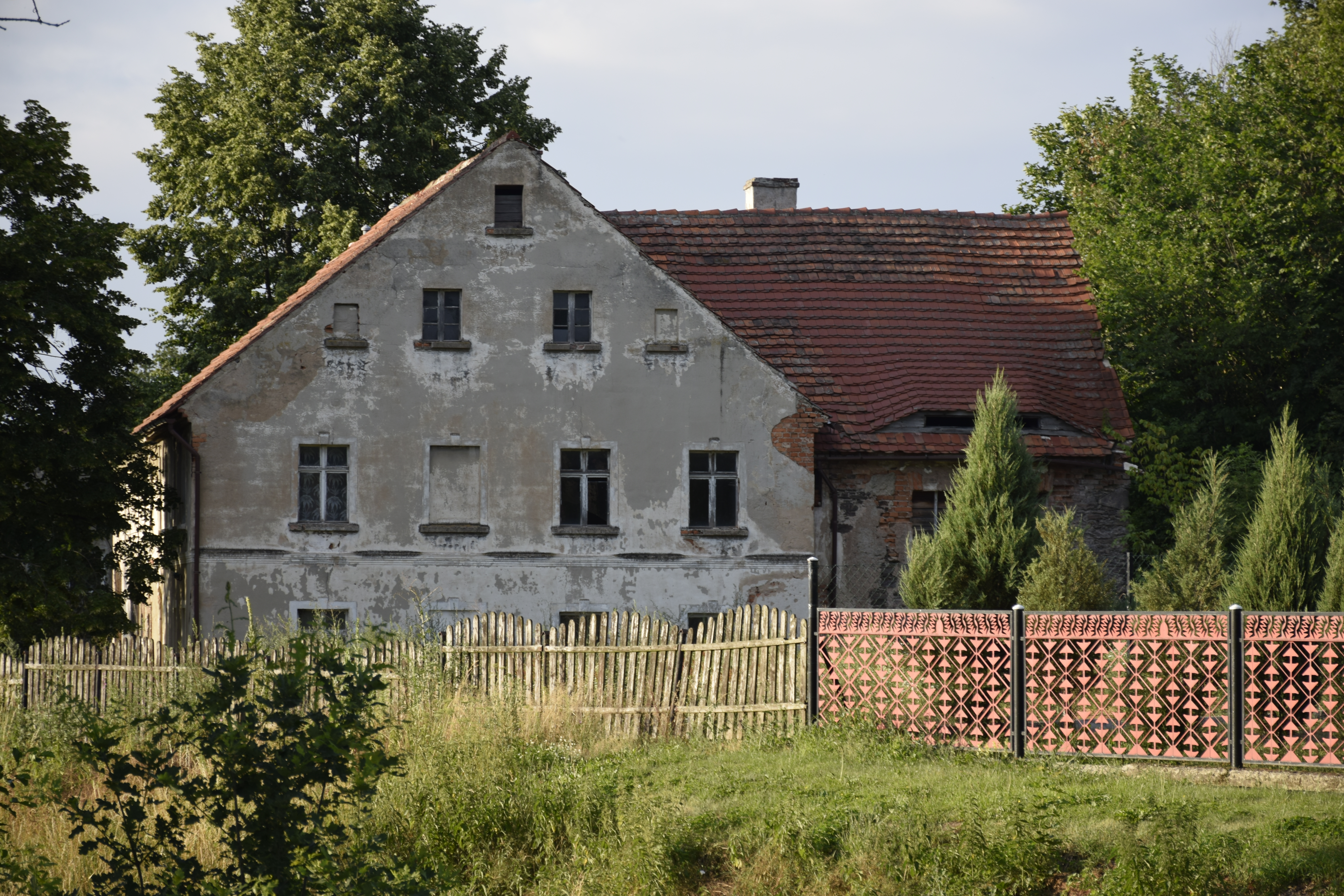 Sady Dolne. Polska.